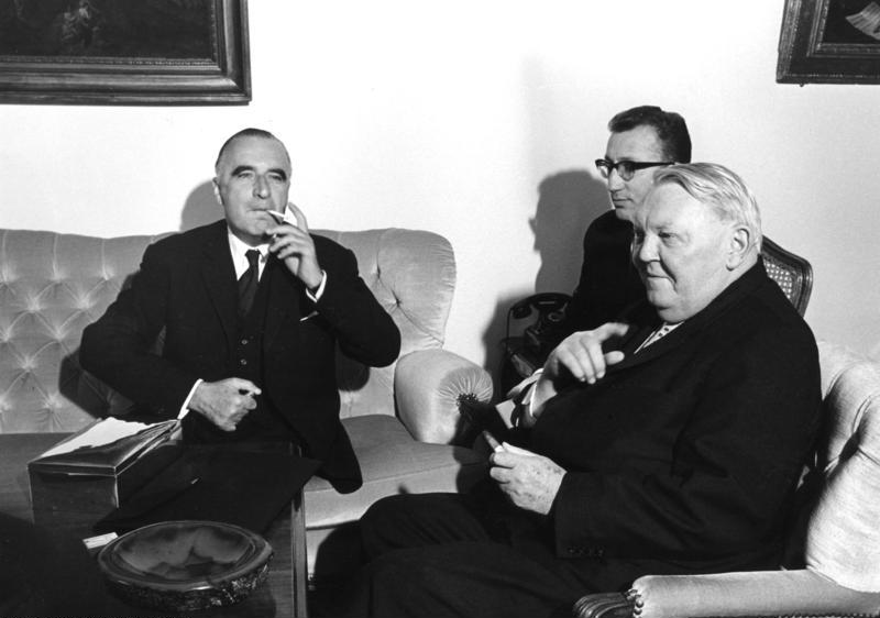 11.6.1965 Besuch des französischen Präsidenten de Gaulle bei Bundeskanzler Ludwig Erhard mit Premierminister Pompidou